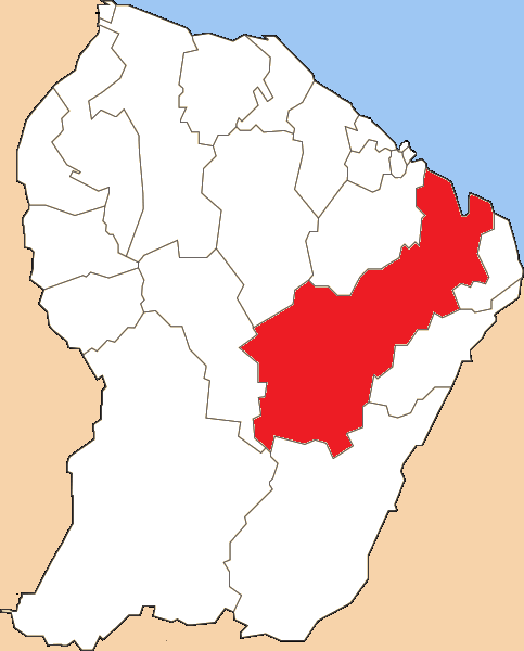 Situation du canton dans le département de la Guyane